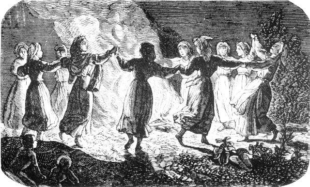 Соботки, или Иван Купала в Польше